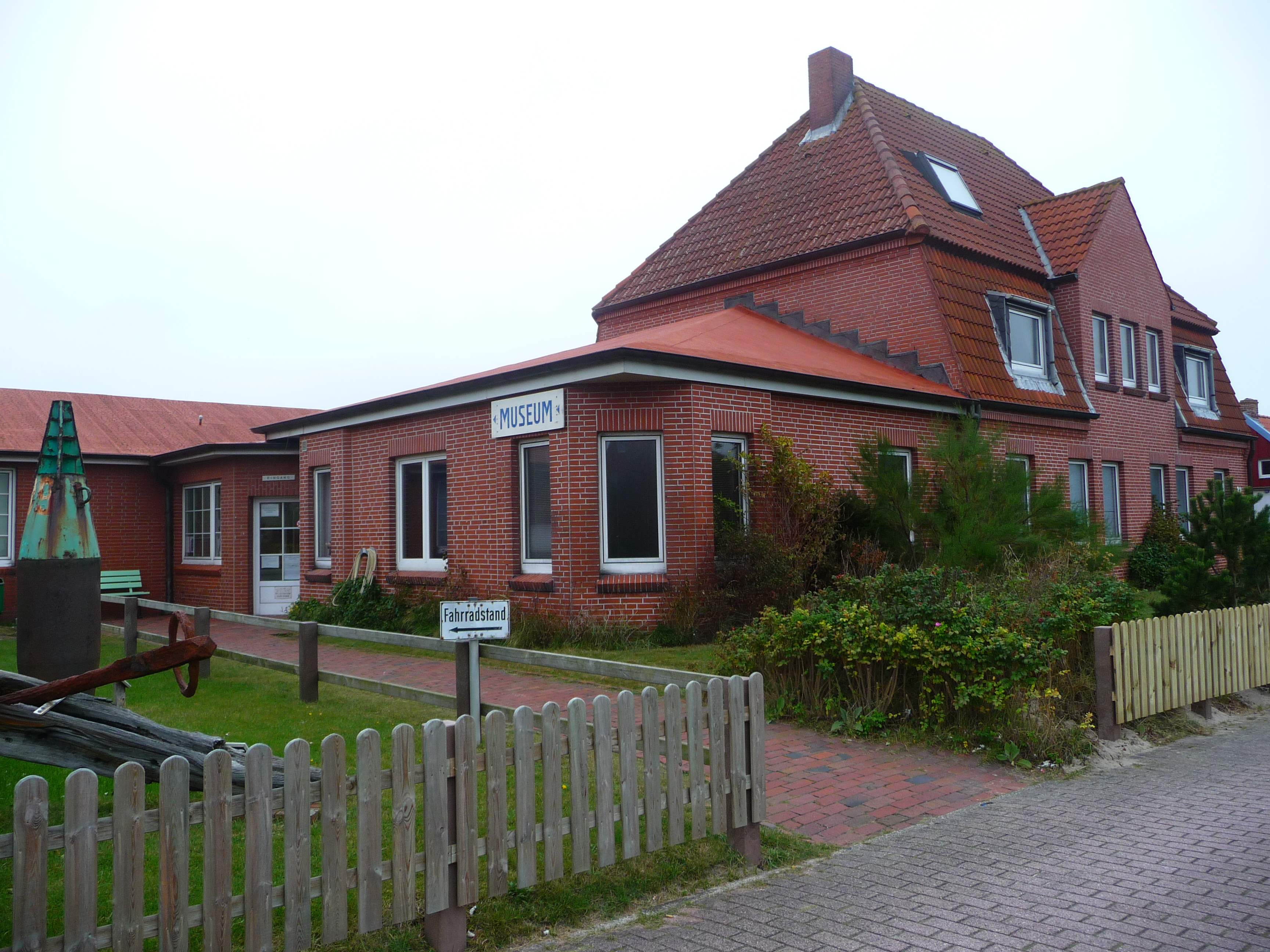 Küstenmuseum im Ortsteil Loog der ostfriesischen Nordseeinsel Juist (Niedersachsen, Deutschland)